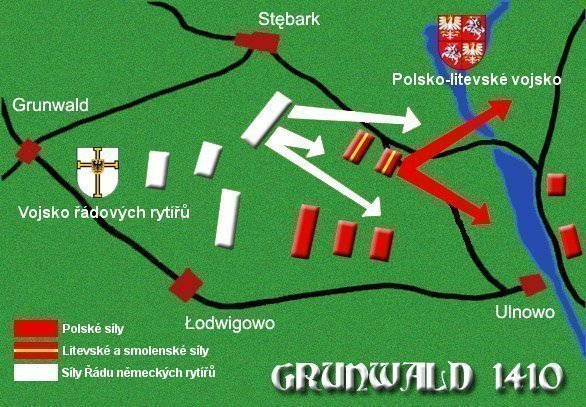 Rozmístění vojsk v úvodní fázi Grunwaldské bitvy 1410